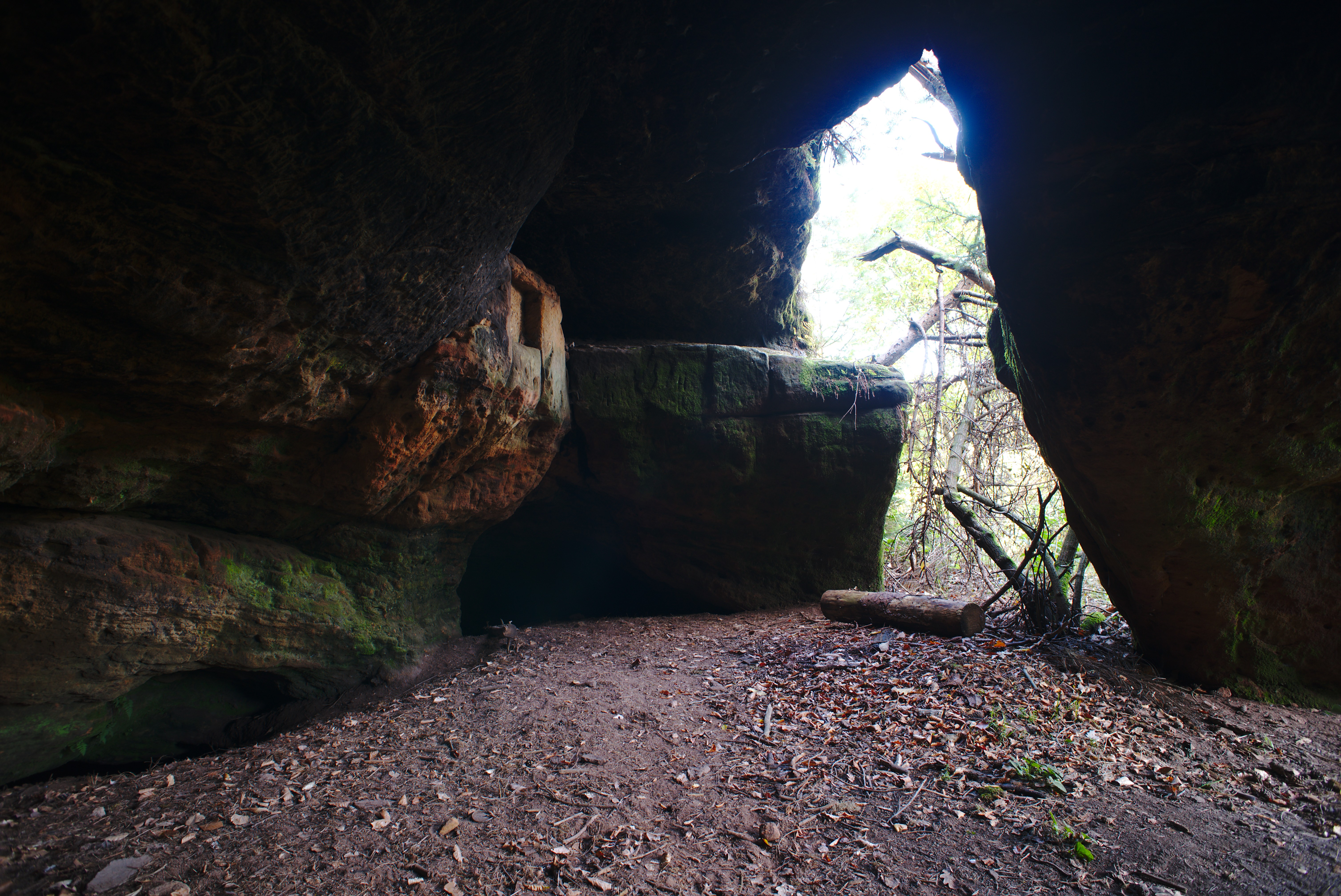 Blick aus der oberen Höhle des Eichertsfelsen nach draußen. Links im Bild scheint ein Rechteck in den Felsen gemeiselt worden sein.